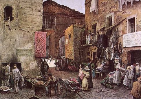 Via Rua in Ghetto, Rome (rione Sant'Angelo)